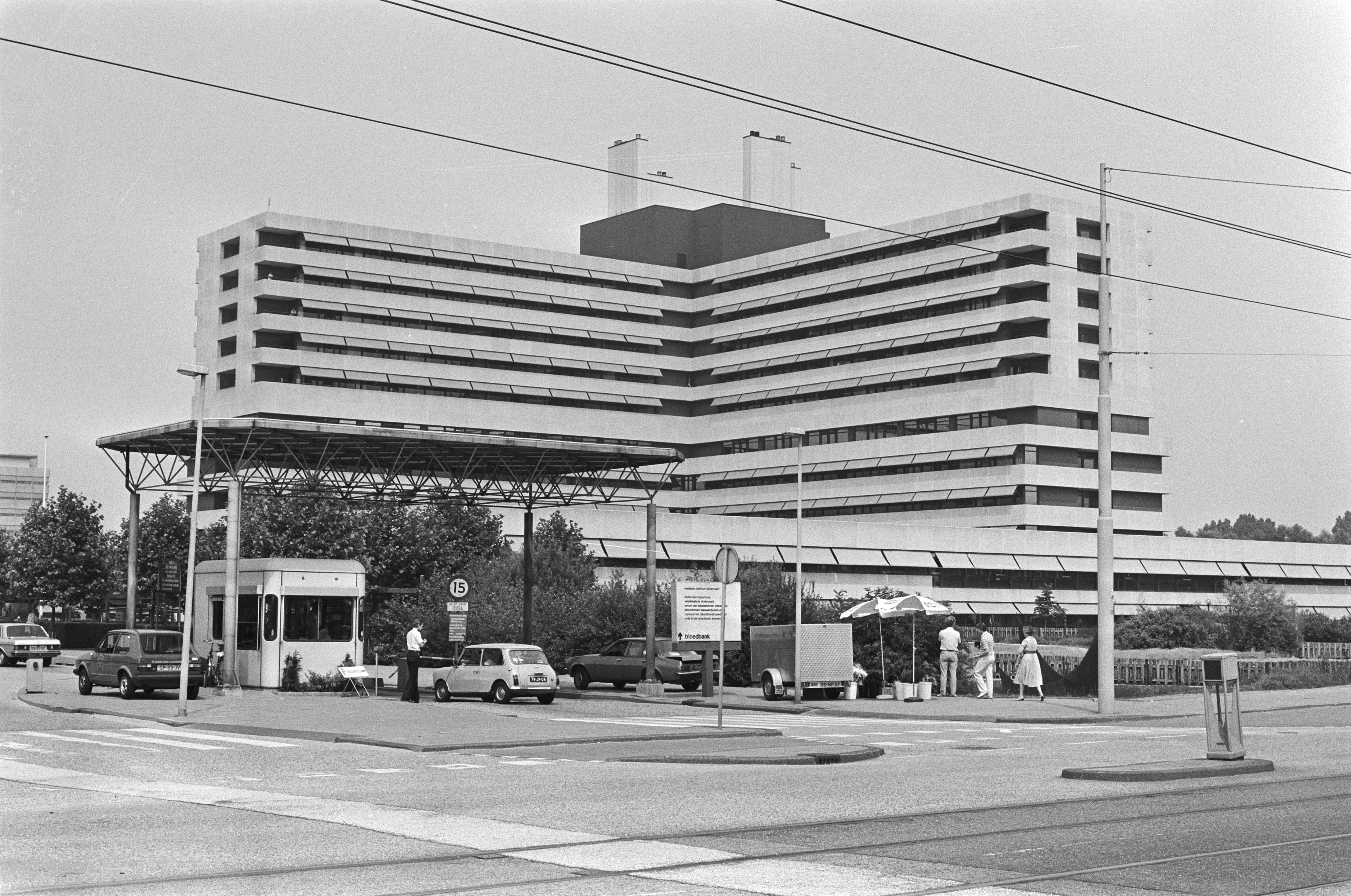 Collectie / Archief : Fotocollectie Anefo Reportage / Serie : [ onbekend ] Beschrijving : Slotervaartziekenhuis Amsterdam, exterieur Datum : 8 juli 1982 Locatie : Amsterdam, Noord-Holland Trefwoorden : ziekenhuizen Fotograaf : Dijk, Hans van / Anefo Auteursrechthebbende : Nationaal Archief Materiaalsoort : Negatief (zwart/wit) Nummer archiefinventaris : bekijk toegang 2.24.01.05 Bestanddeelnummer : 932-2400